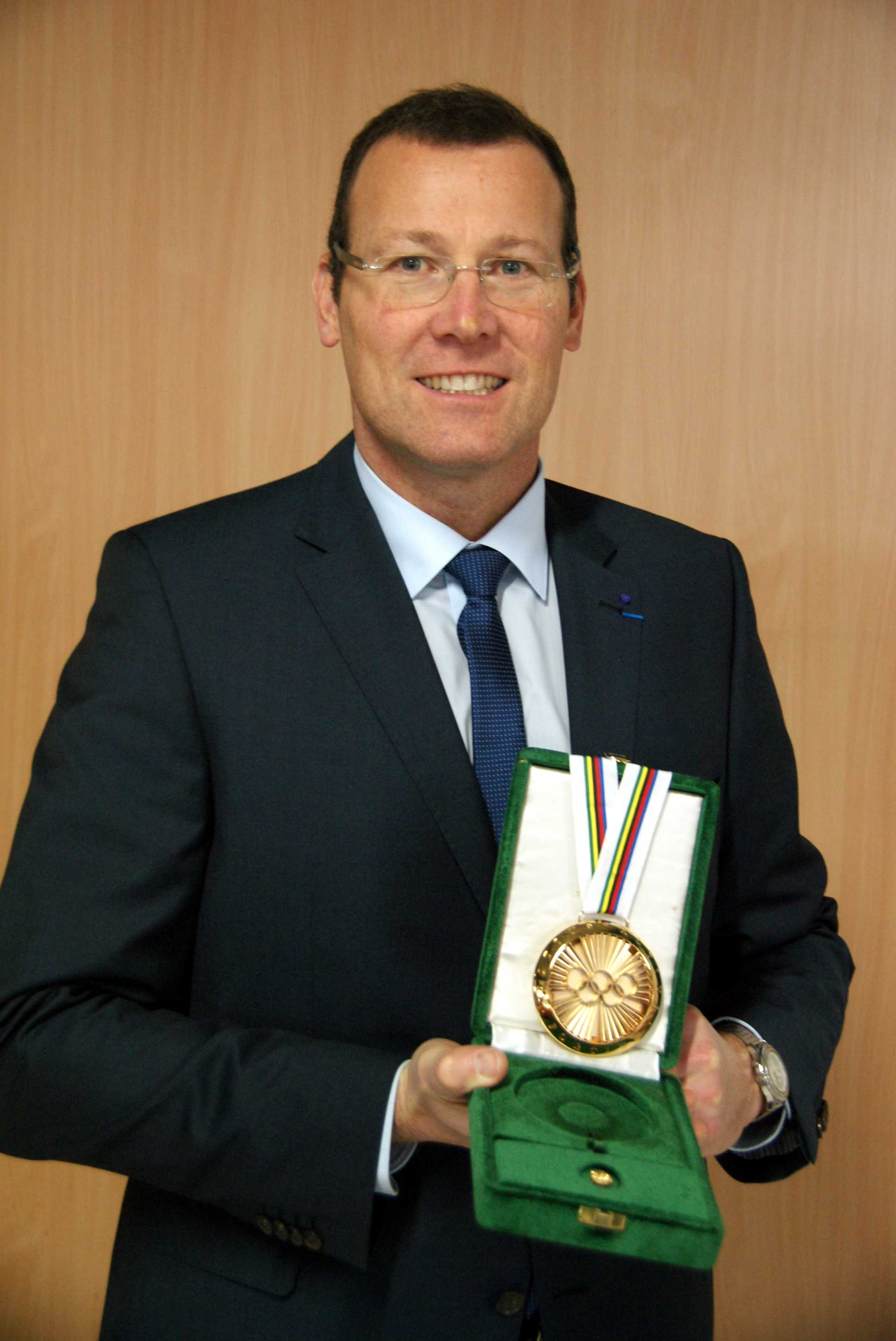 Distinction Eric Monin